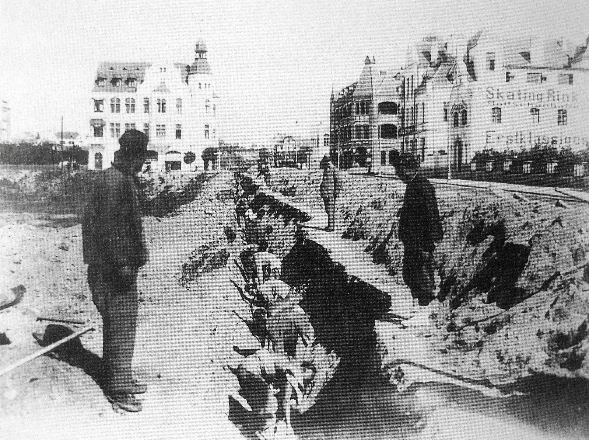 青岛安徽路南端电缆铺设旧影